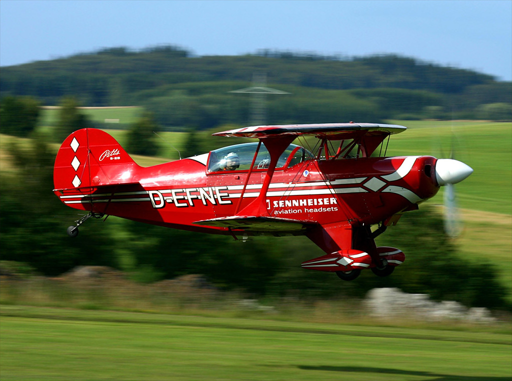 Pitts S-2B (D-EFNE)